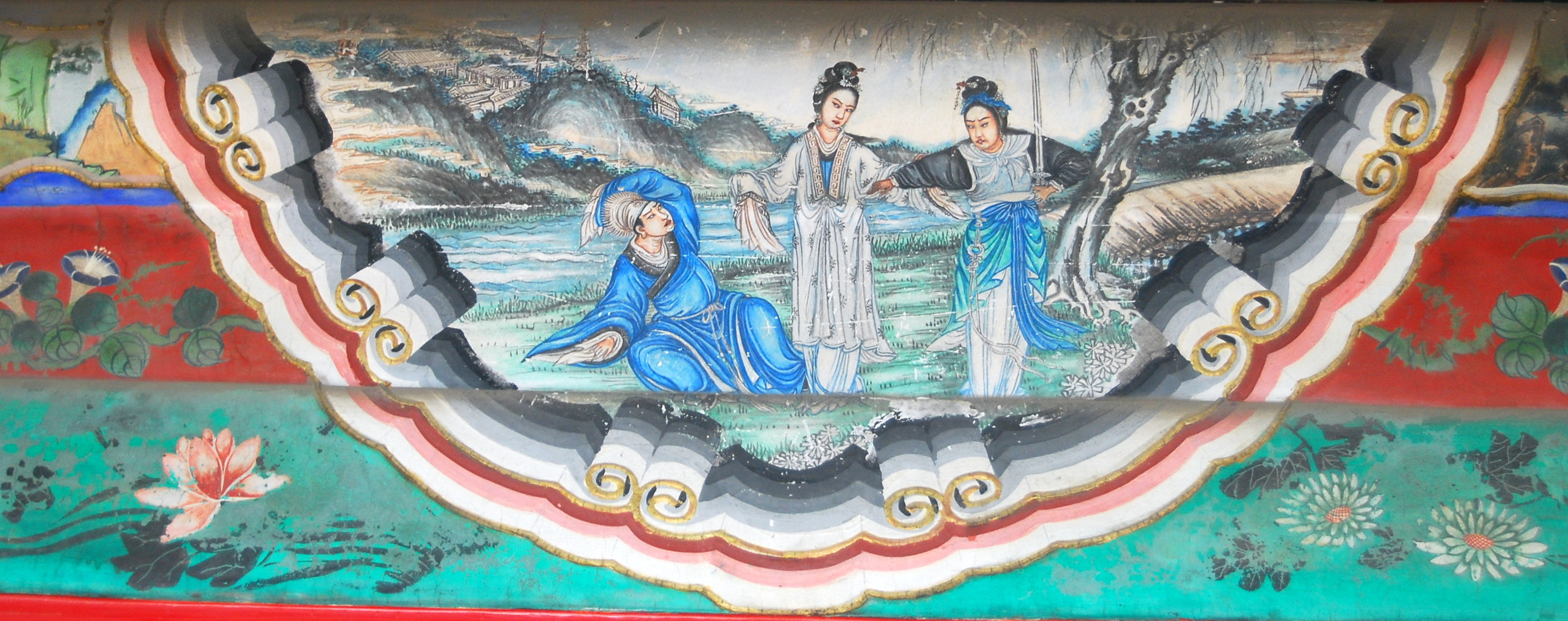 颐和园长廊彩绘：断桥解怨（白蛇传故事）